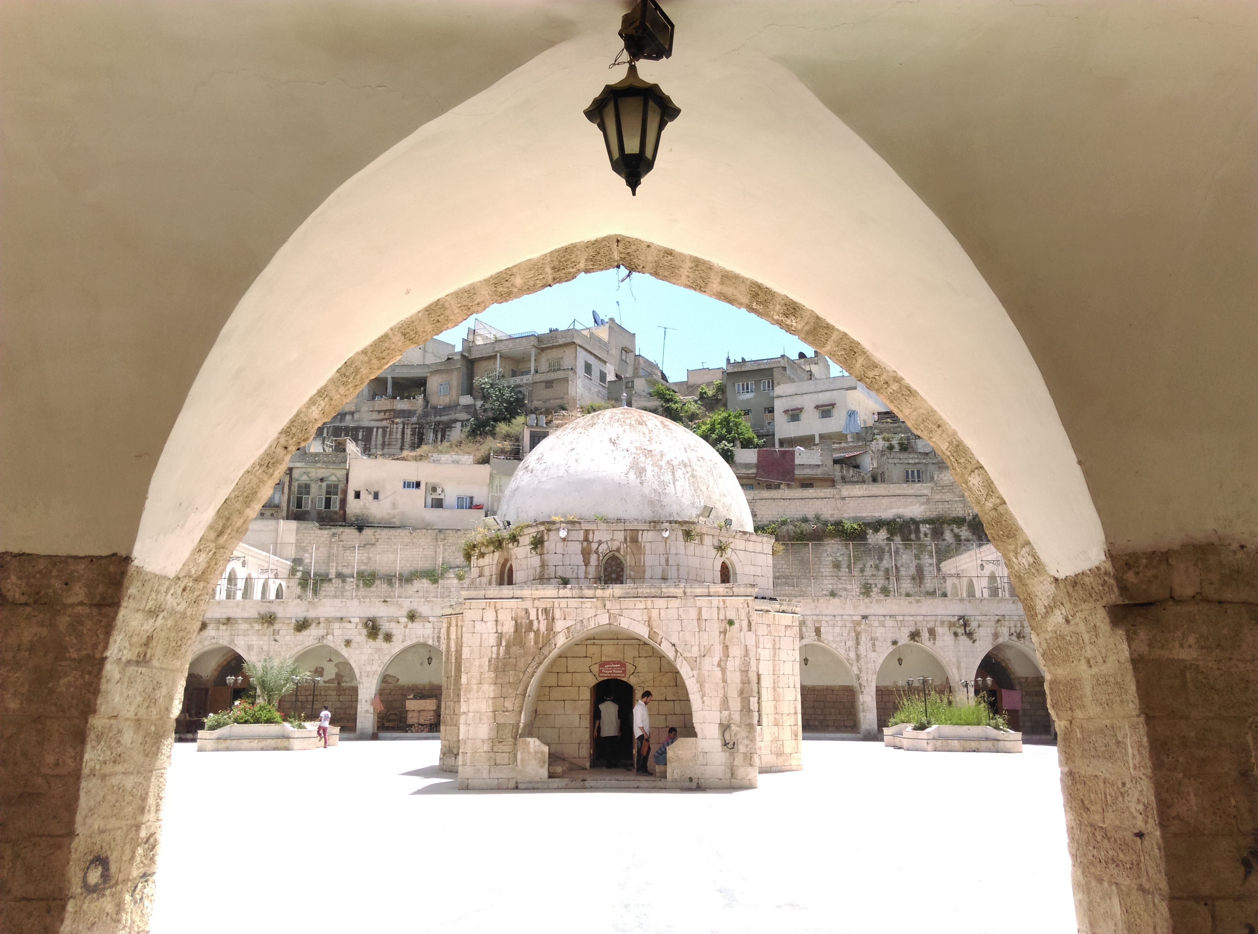 مدخل خان رستم باشا والمصلى الذي يتوسط الفناء